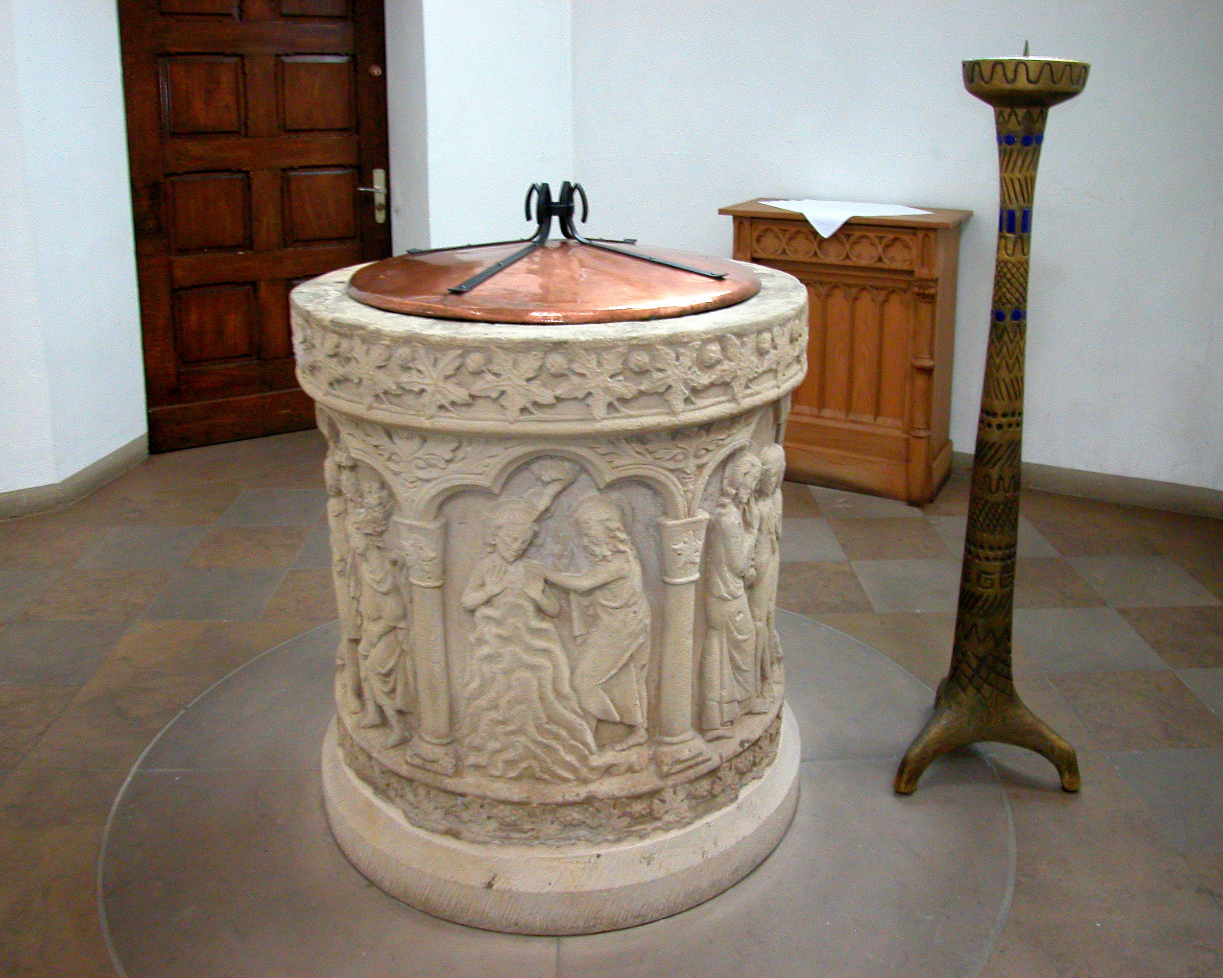 Taufstein in St. Marien. Luenen (de). Купель в церкви св. Марии. Люнен (ru).